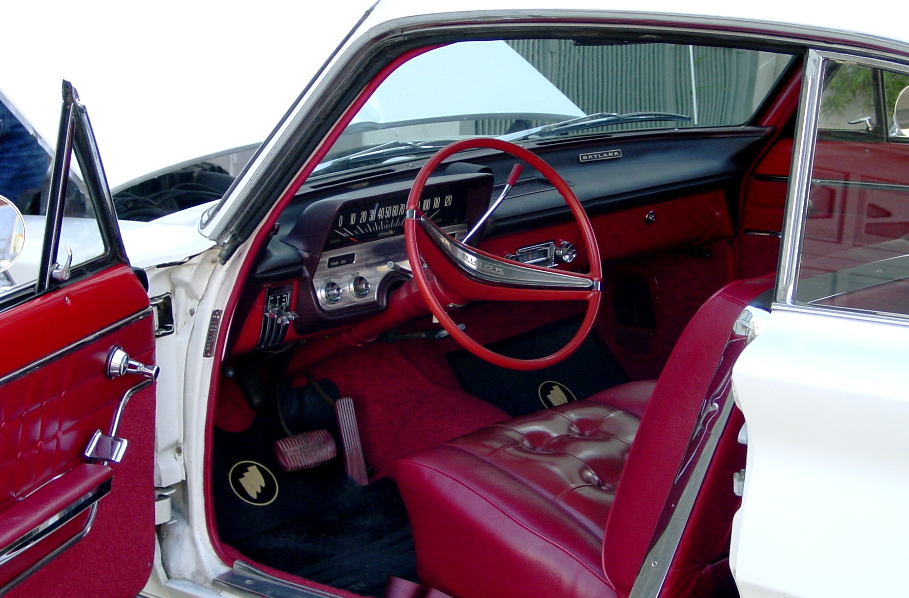 Buick Skylark 63 (je ne suis pas certain que ce soit un modèle 1963)